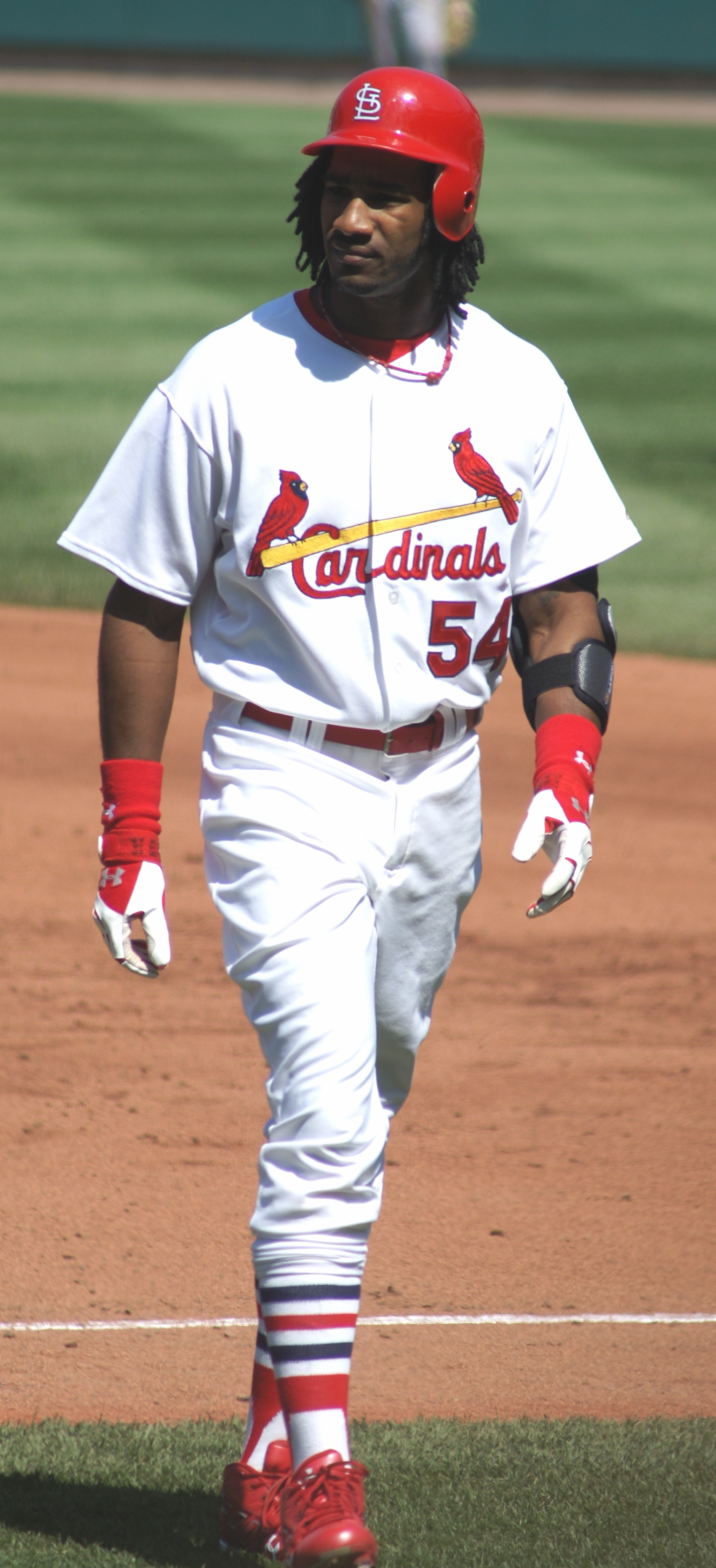 Brian Barton